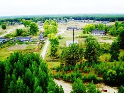 Пос.86-й Квартал с высоты Эвереста Обь-Томского междуречья